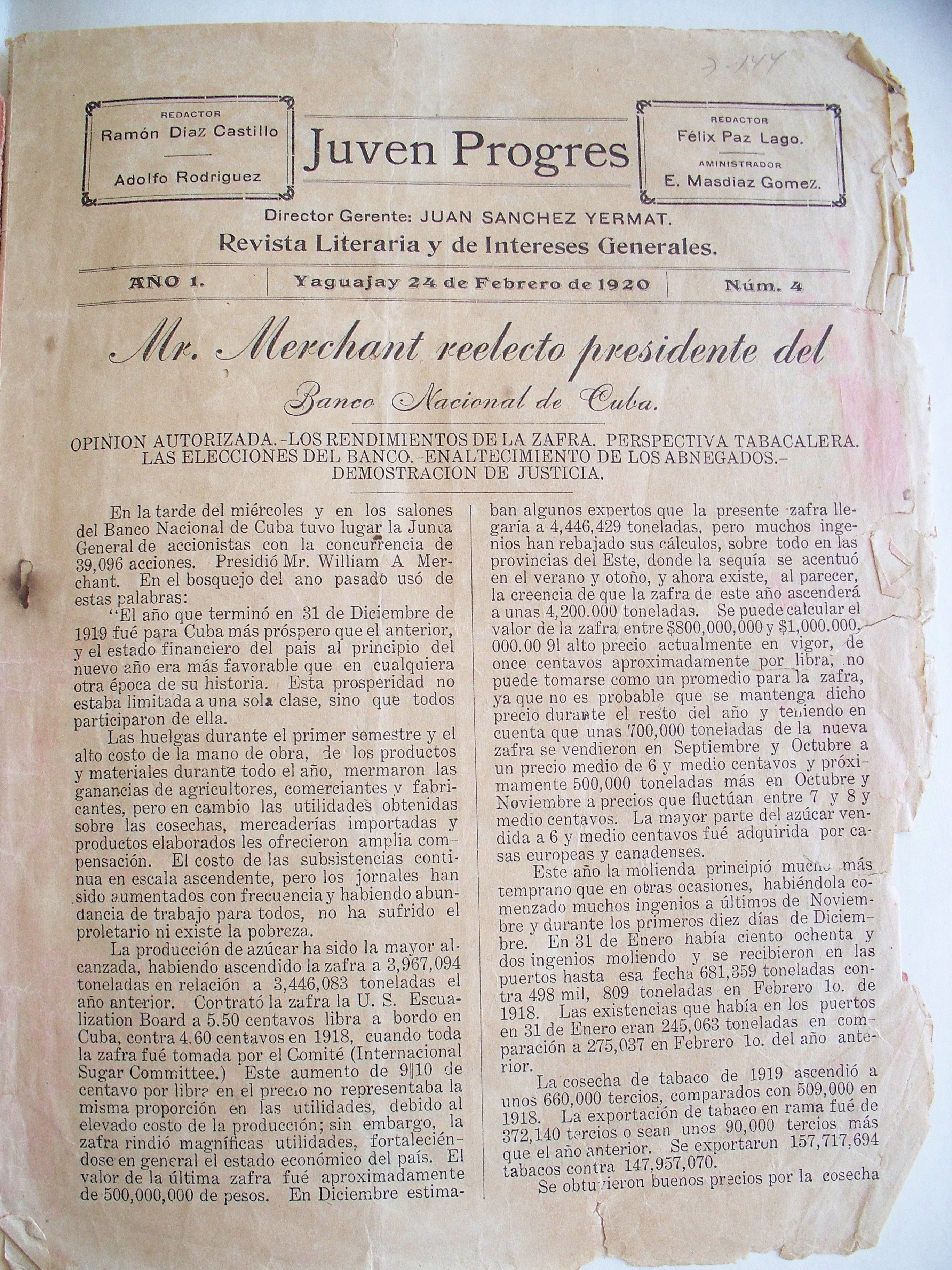 Portada de un ejemplar de la publicación Juven Progres, Yagauajay, 1920